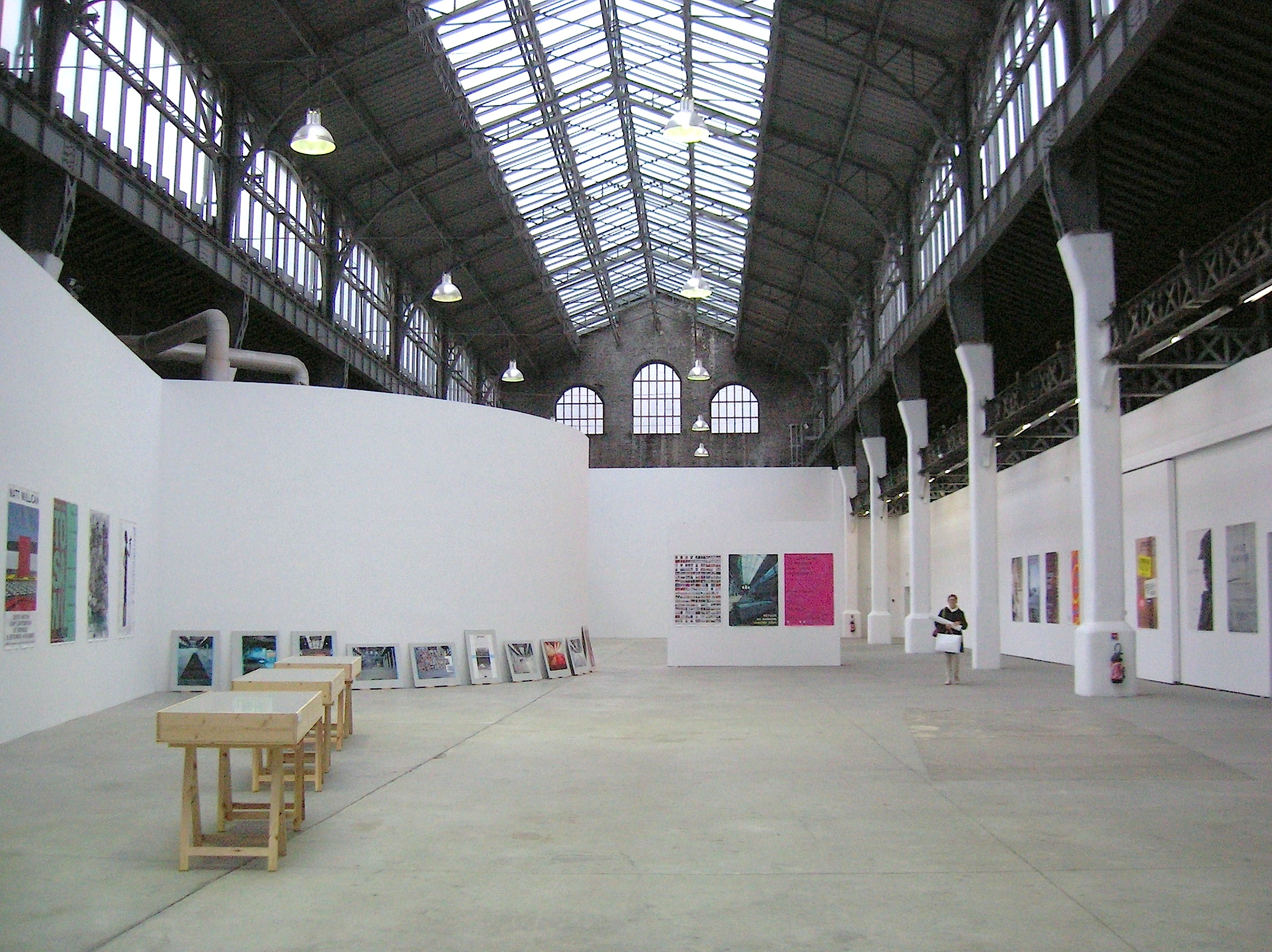 Le centre national d'art contemporain Le Magasin, ouvert pour les journées européennes du patrimoine 2016. Grenoble, Isère, AuRA, France.